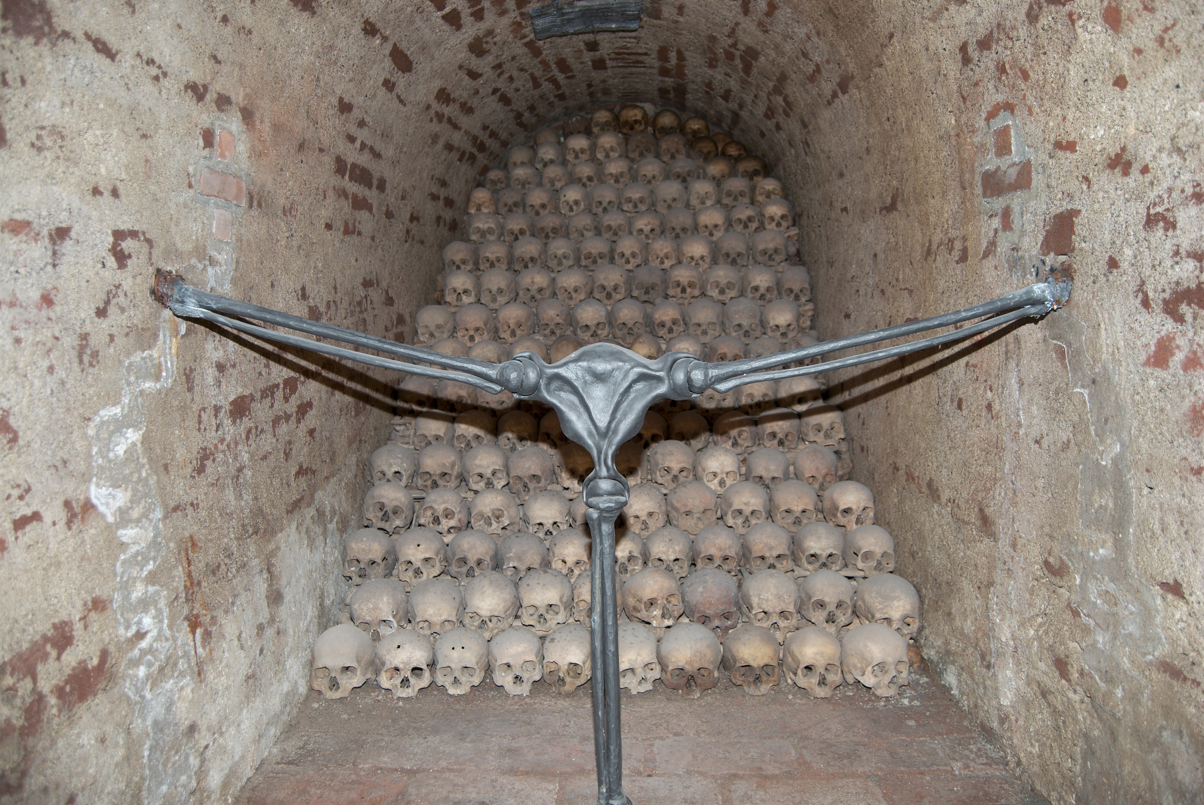 Moderní stylová zábrana v kostnici pod brněnským kostelem sv. Jakuba, vyrobená uměleckým kovářem